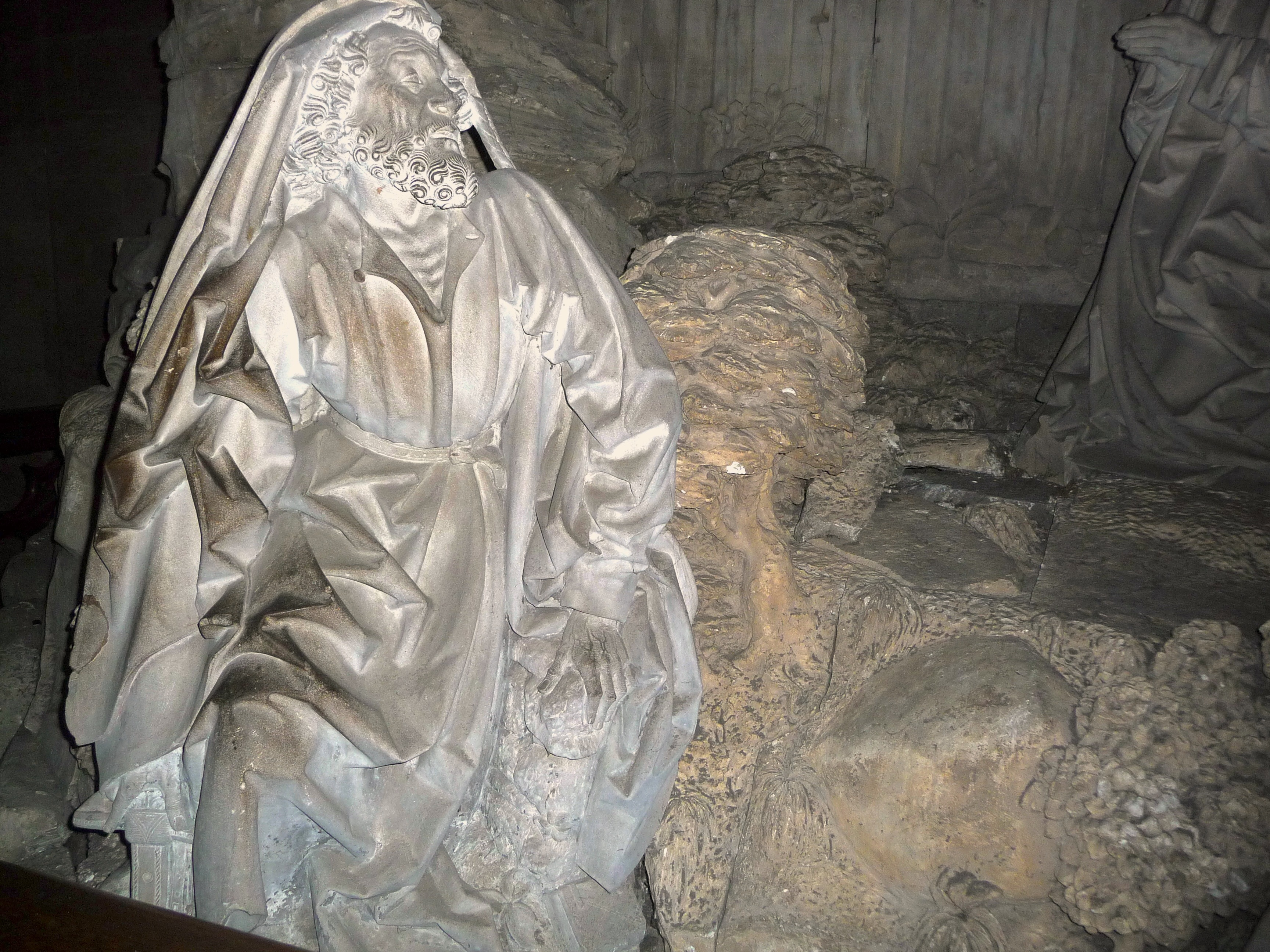 Réveillé par l'arrivée de Judas et de ses acolytes, Pierre s'apprête à dégainer son glaive, visible dans le prolongement de son bras droit.